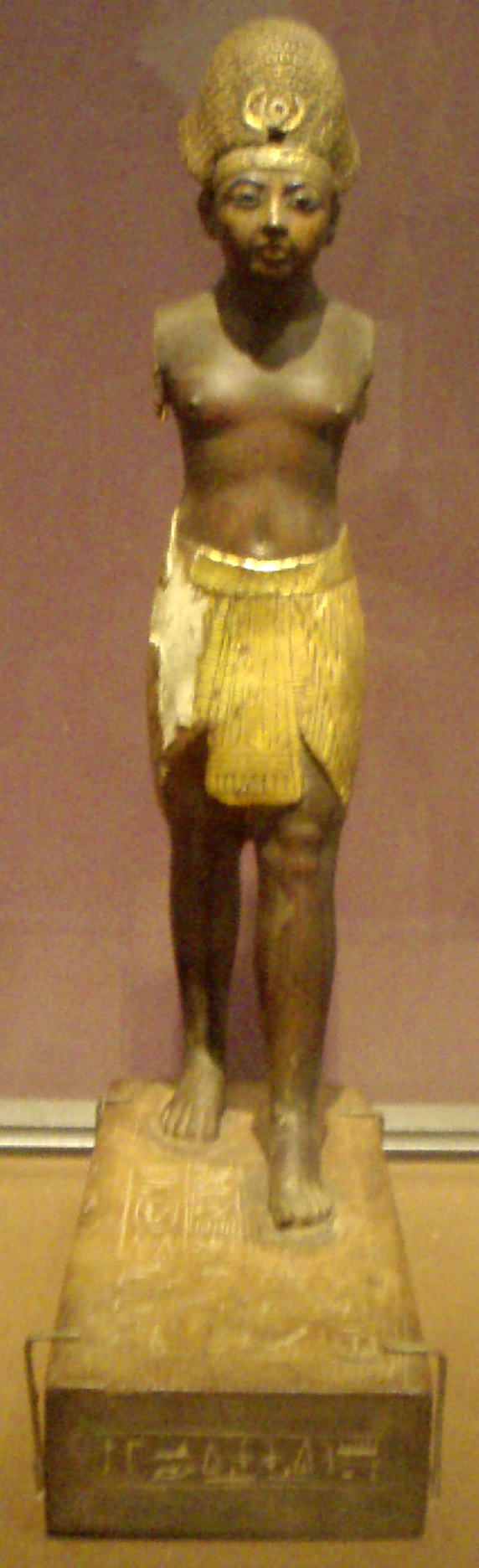 Wooden statuette of Amenhotep II.